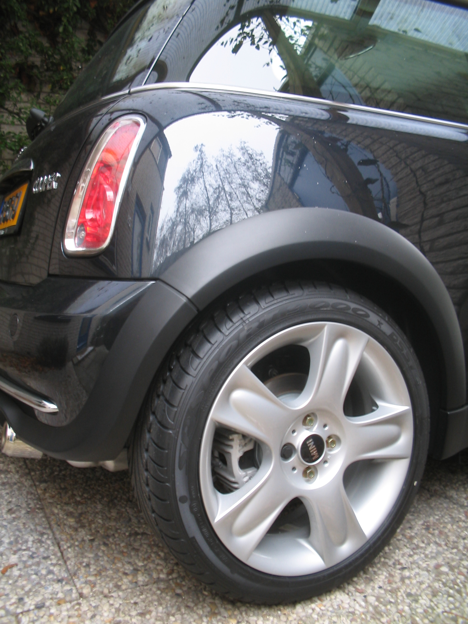 Lichtmetalen 5-spaaks velg van Mini Cooper